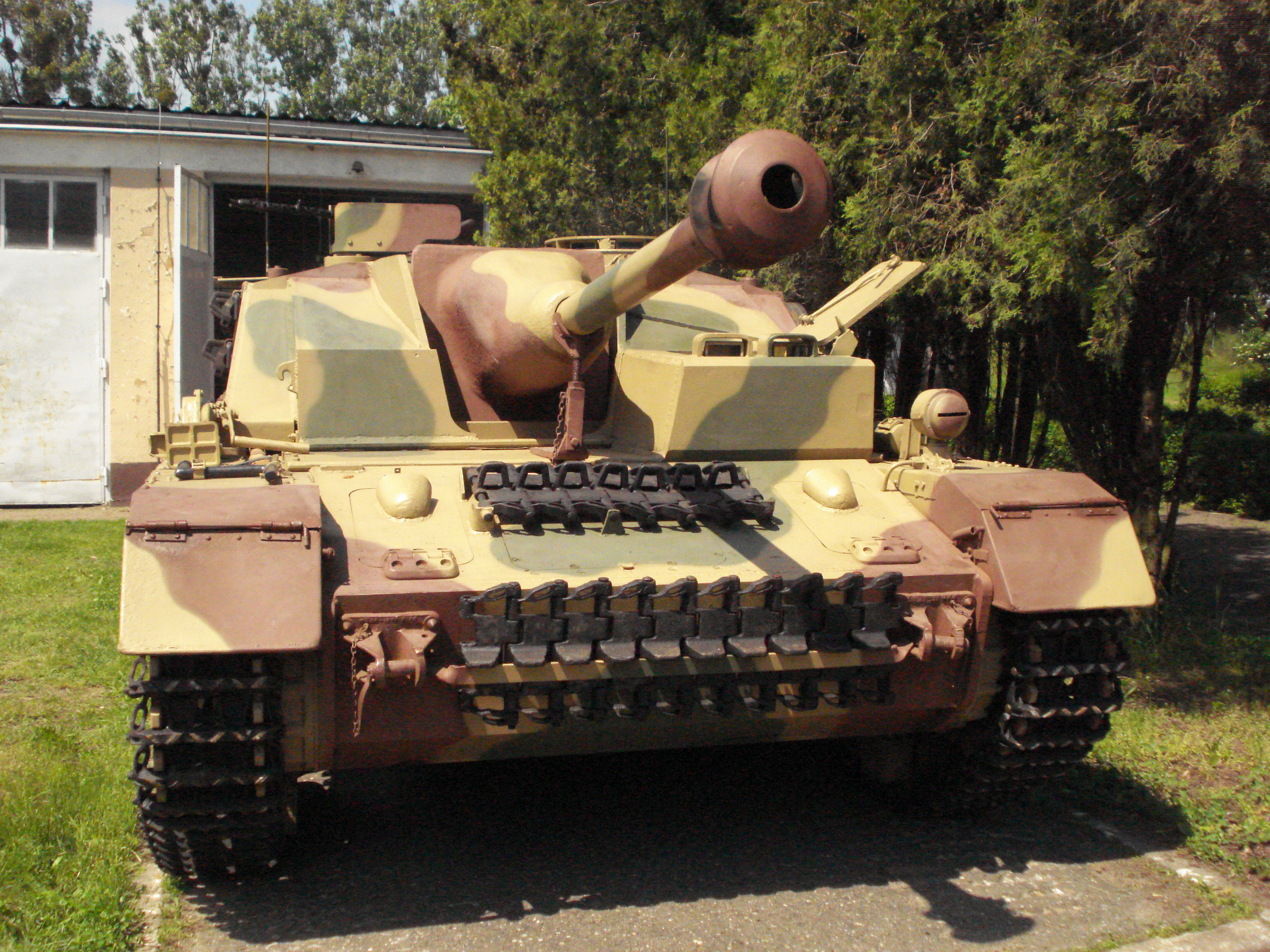 Sturmgeschutz iv Muzeum Broni Pancernej CSWL.JPG